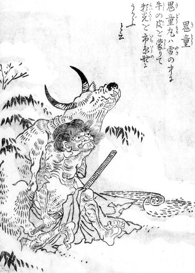 Kidō (鬼童) from the Konjaku Hyakki Shūi (今昔百鬼拾遺)